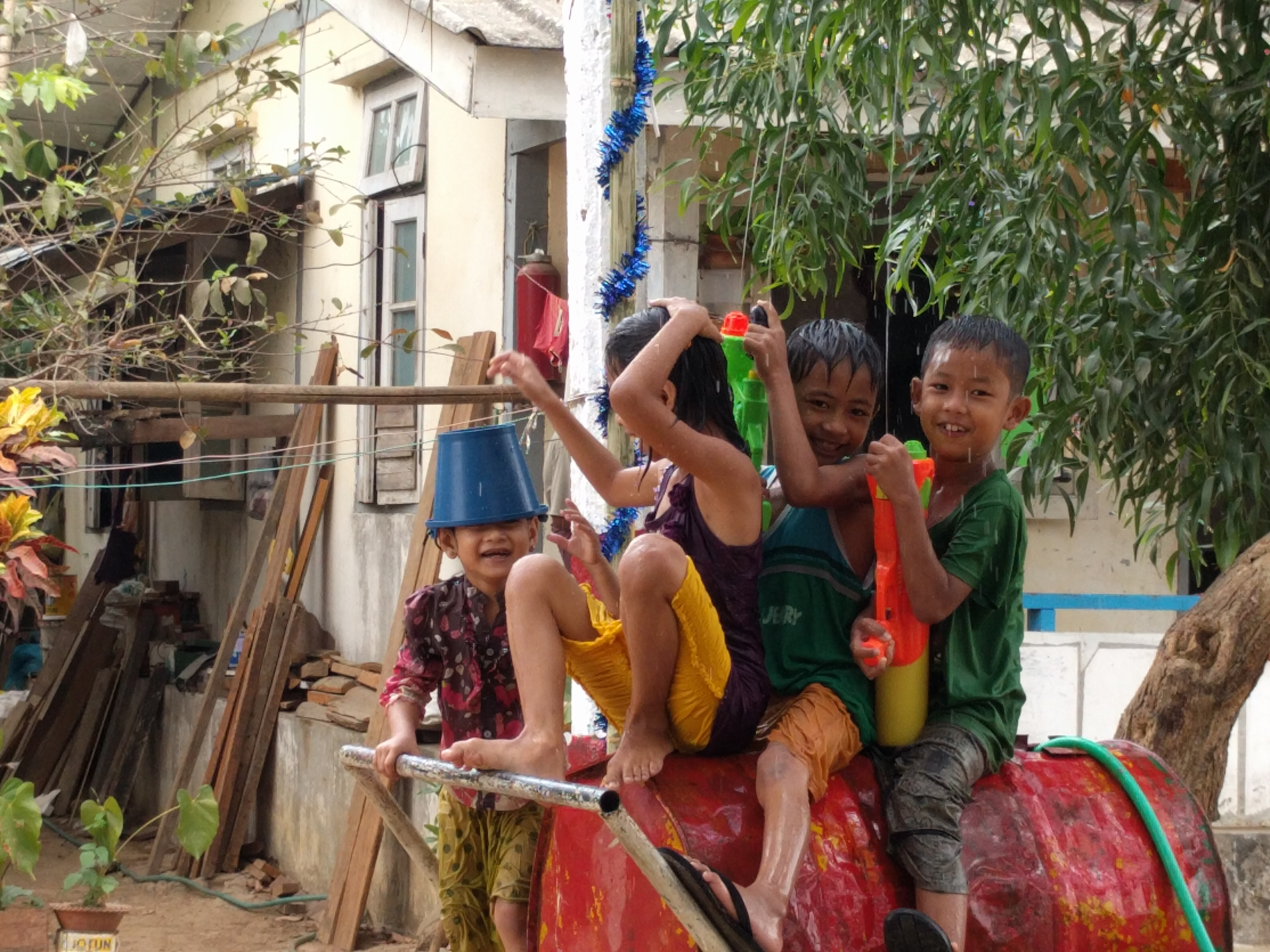 မြန်မာဘာသာ: ကျေးလက်ဒေသ သင်္ကြန်